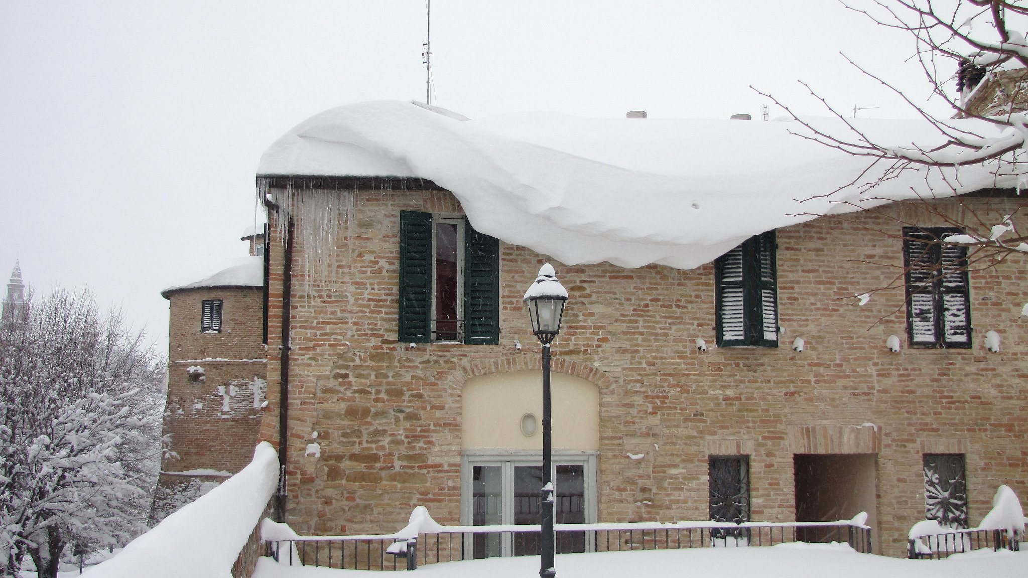 nevicata febbraio 2012